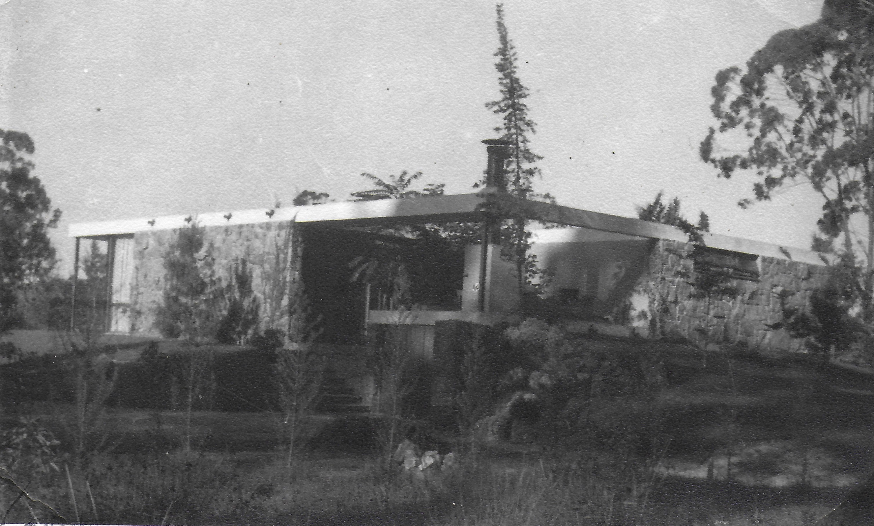 Xalet de Punta Ballena, Uruguai, anys 1960, residència del matrimoni Miquel Ortín i Margarida Xirgu